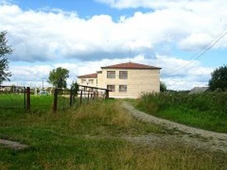 Библиотека Акинфиево